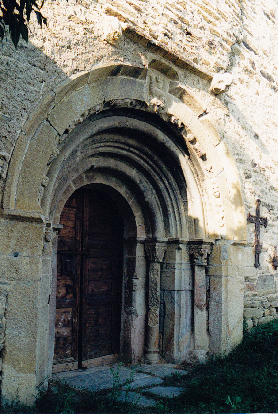 Espagne - Basse-Cerdagne - Ger - Saga - Église Sainte-Eugénie